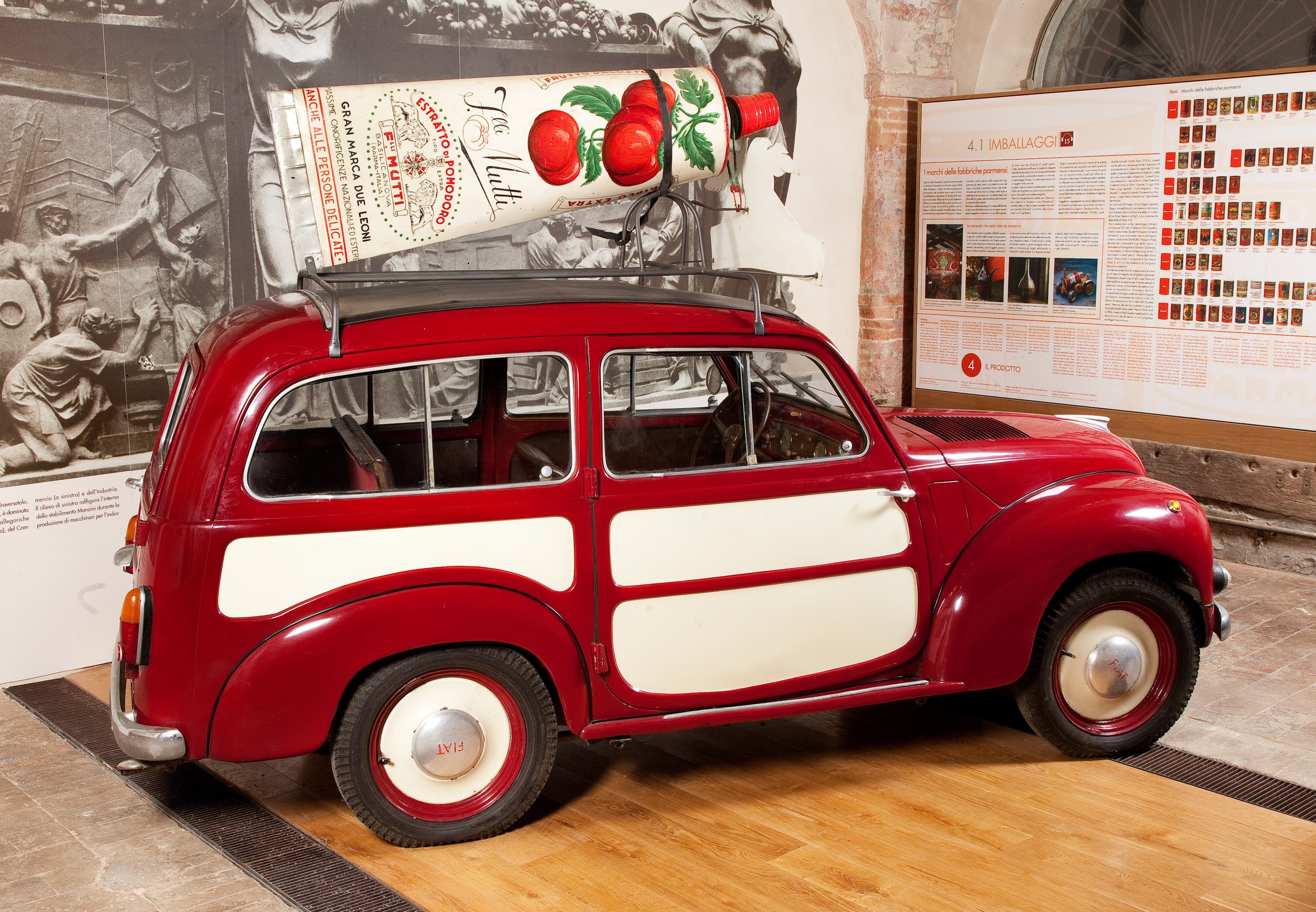 Automobile Fiat Topolino Giardinetta sormontata da un tubetto gigante di concentrato di pomodoro. La chiusura del tubetto è un ditale di plastica. Su entrambi i lati del tubetto è la scritta pubblicitaria/ descrittiva stampata a lettere capitali e in corsivo 'FRUTTO D'AGOSTO/ F.lli Mutti/ ESTRATTO DI POMODORO/ TIPO EXTRA/ F.LLI MUTTI/ BASILICANOVA/ (PARMA-ITALIA)/ GRAN MARCA DUE LEONI/ TANTISSIME ONORIFICENZE NAZIONALI ED ESTERE/ PRODOTTO PURO GENUINO INDICATO/ ANCHE ALLE PERSONE DELICATE'. Su una targa sul tetto dell'automobile è la scritta eseguita a pennello 'IL TUBETTO DAL DITALE'.